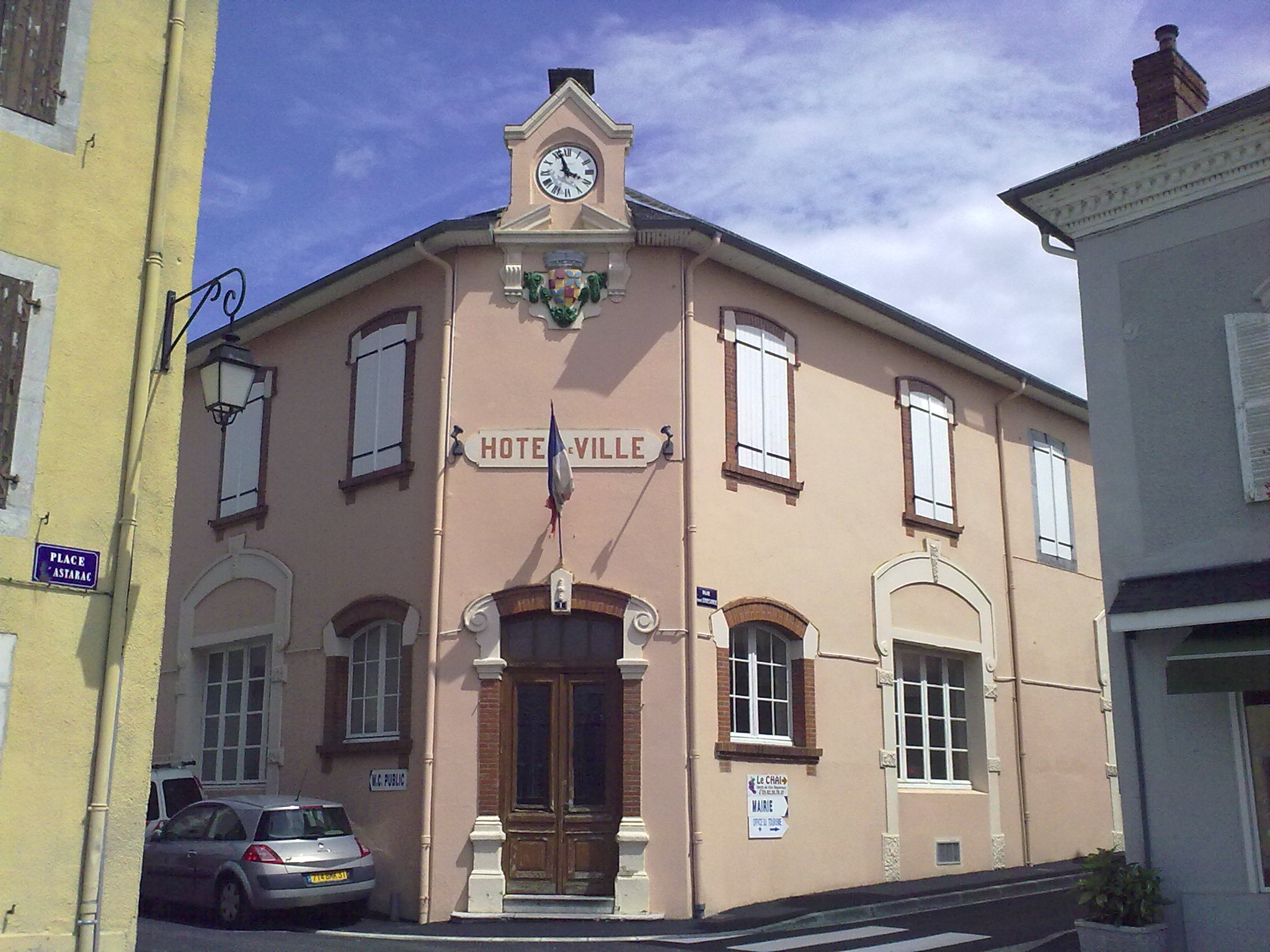 Tournay